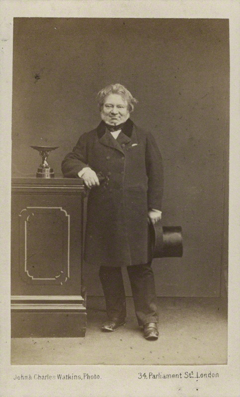 Thomas Landseer (1793 o. 94 - 1880) Fotografie von John und Charles Watkins, um 1860. 88 mm x 55 mm. Photographs Collection, NPG Ax17136